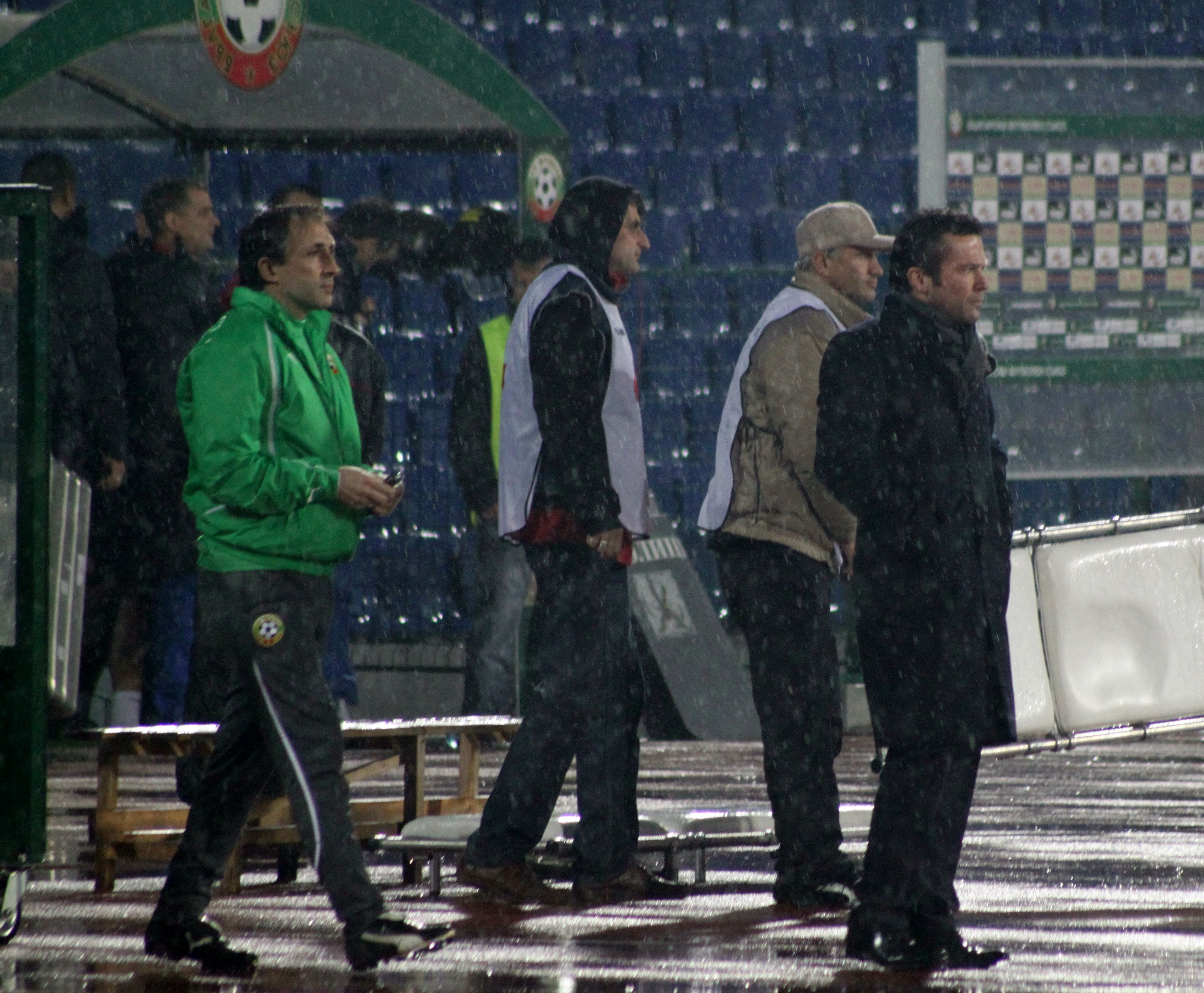 Lothar Herbert Matthäus (* 21. März 1961 in Erlangen) ist ein ehemaliger deutscher Fußball spieler und war zum Zeitpunkt der Aufnahme Nationaltrainer von Bulgarien. Er gilt als einer der besten deutschen Spieler der Geschichte.